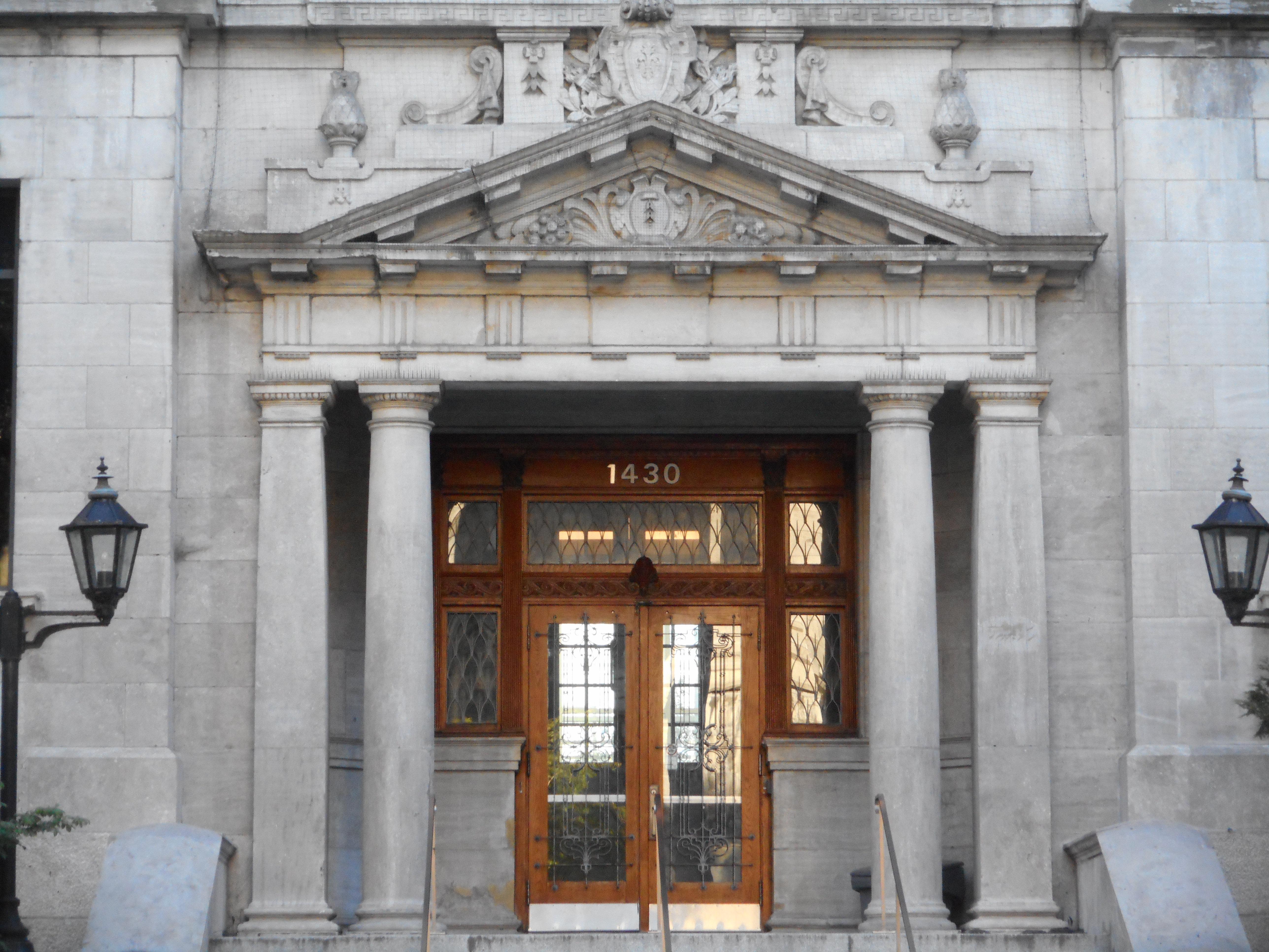 Pavillon Athanase-David de l’Université du Québec à Montréal, 1430 rue Saint-Denis. - info. Ancienne École Polytechnique de Montréal. Architecte: Joseph-Émile Vanier.